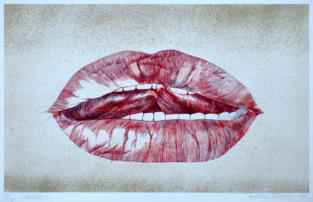 Naděžda Plíšková, Polibek, kombinovaná technika, 1981